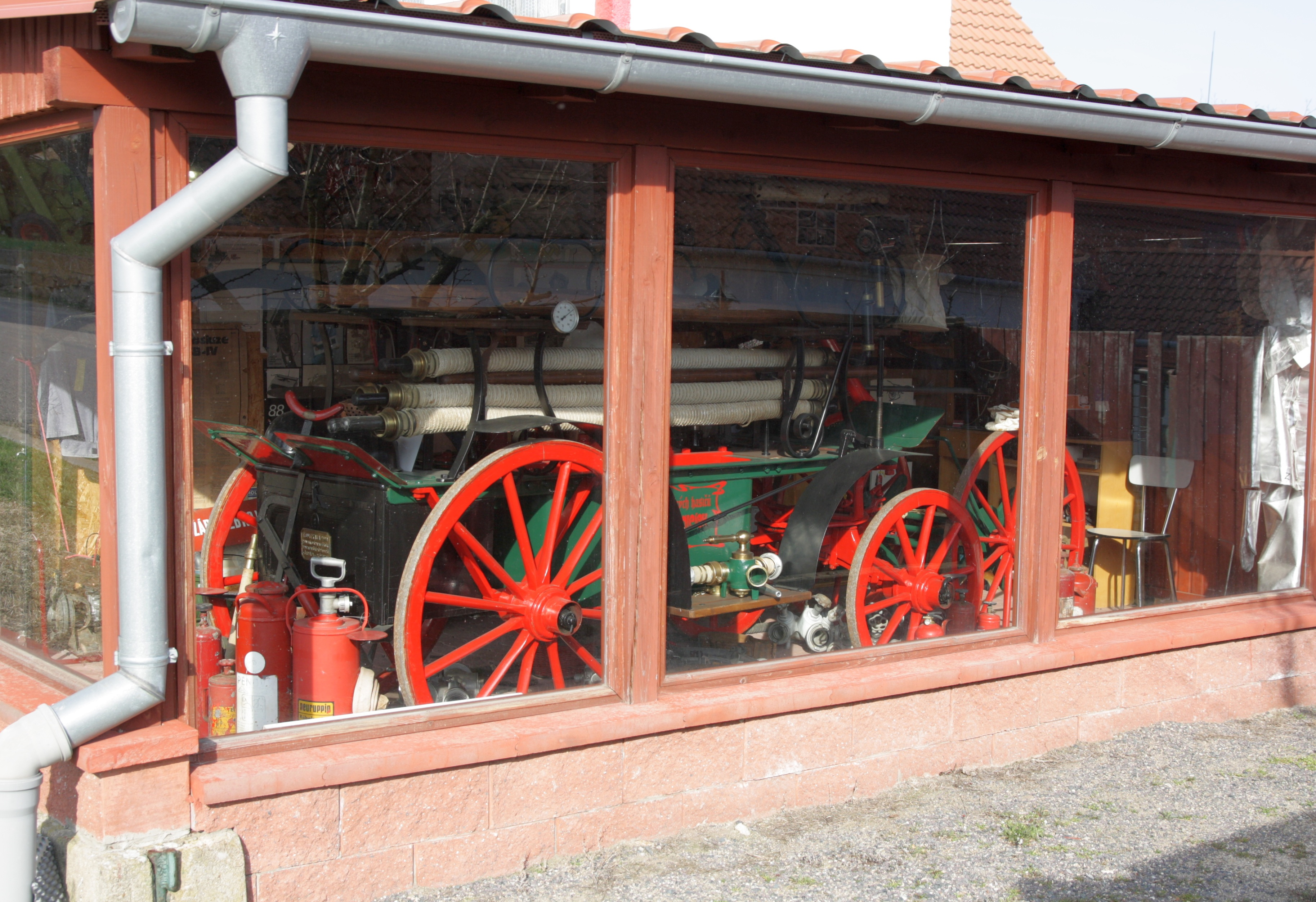 Horní Kounice - historická stříkačka u hasičské zbrojnice.